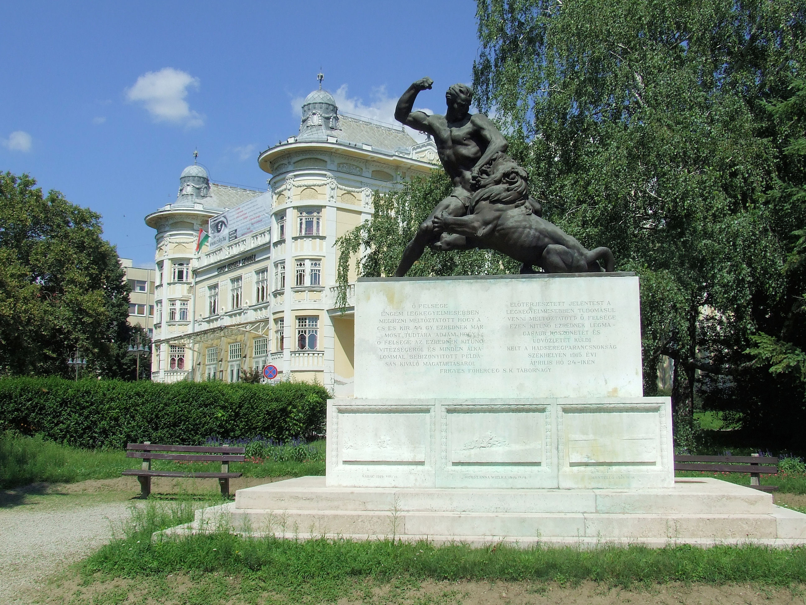 A 44. gyalogezred emlékműve a kaposvári Rákóczi téren. Jálics Ernő szobrászművész alkotása (1932)